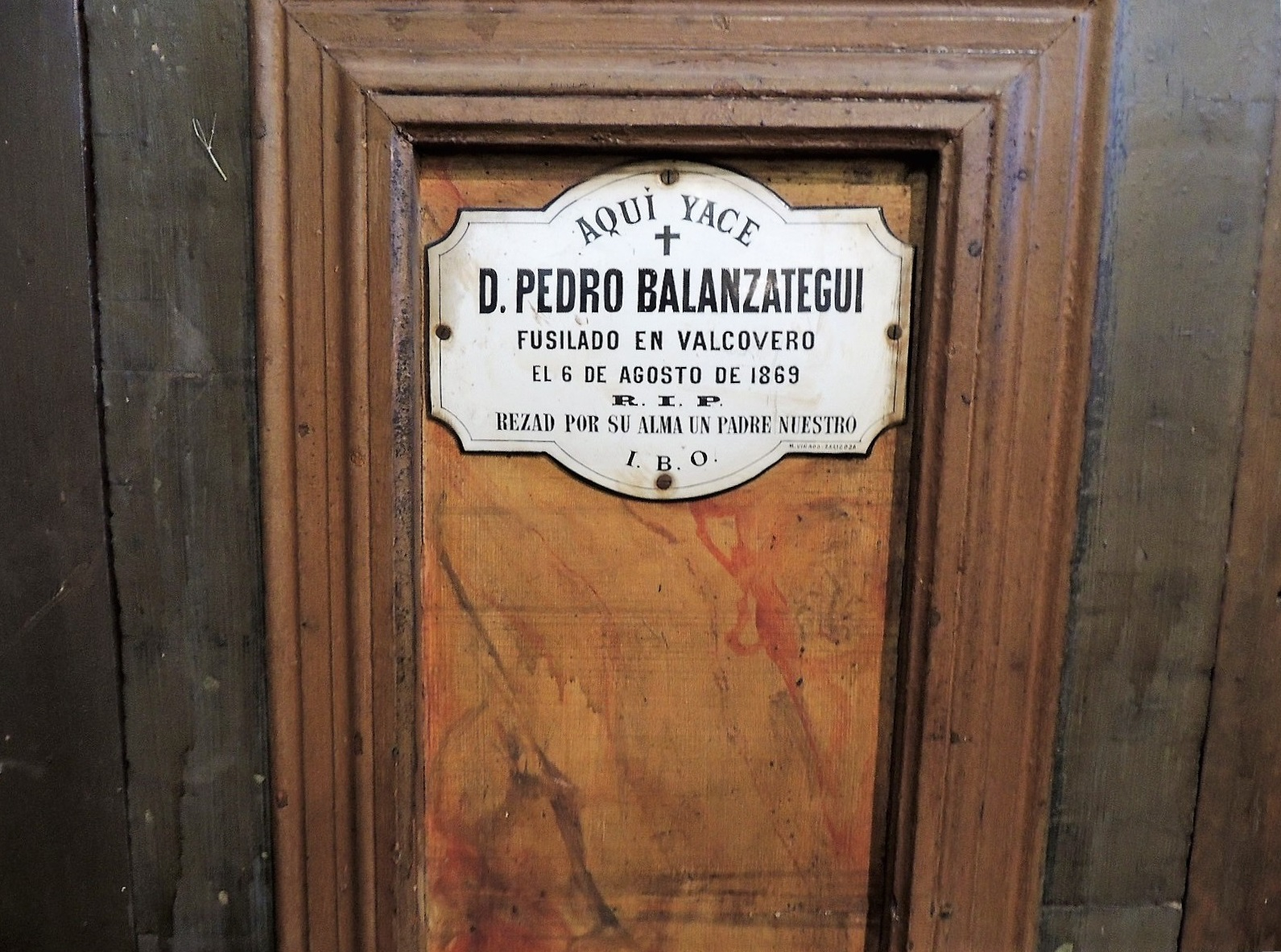 Tumba de Pedro Balanzátegui junto al altar de la iglesia de Cembranos, León.